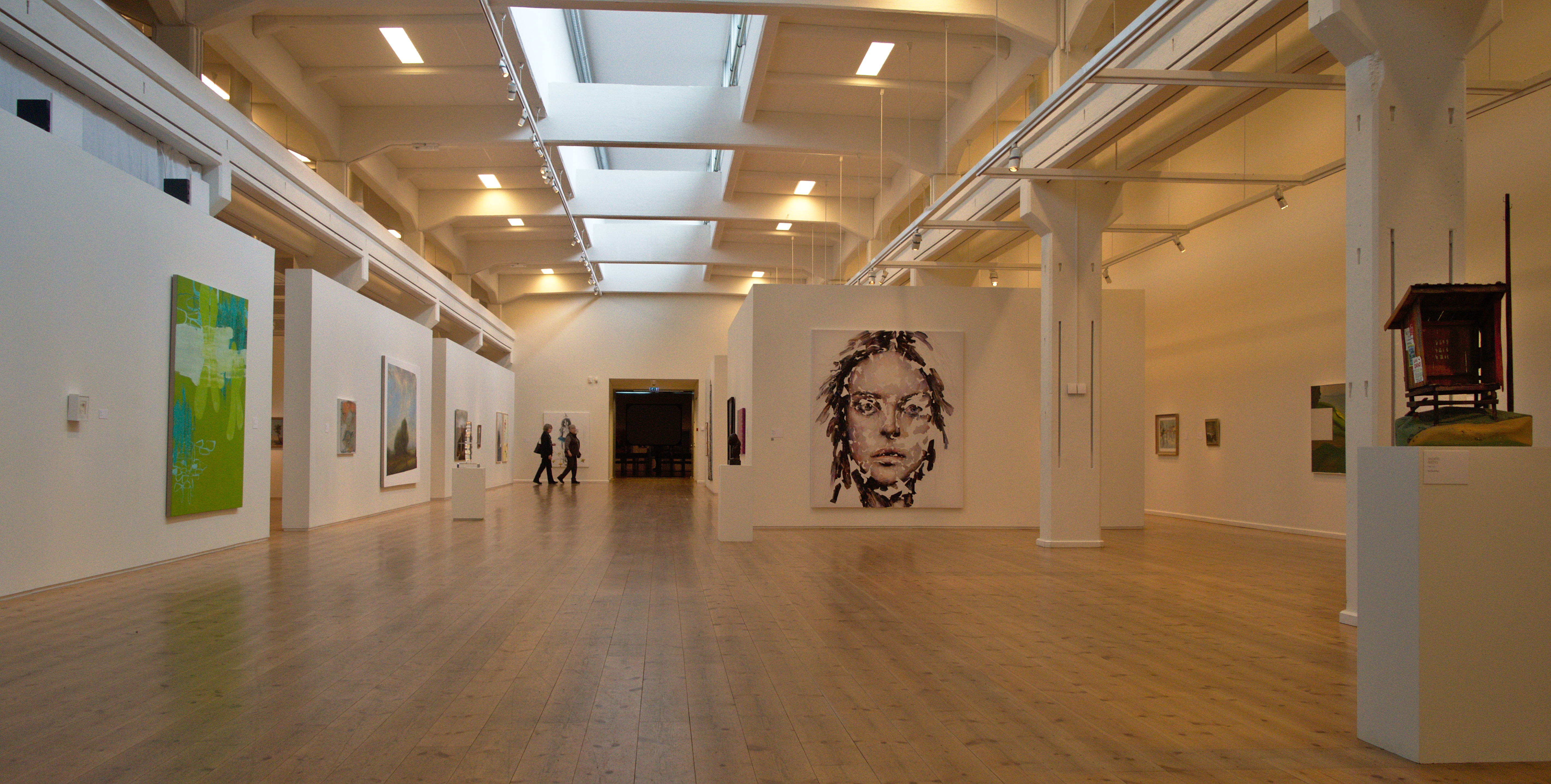 Eskilstuna konstmuseum - insida.